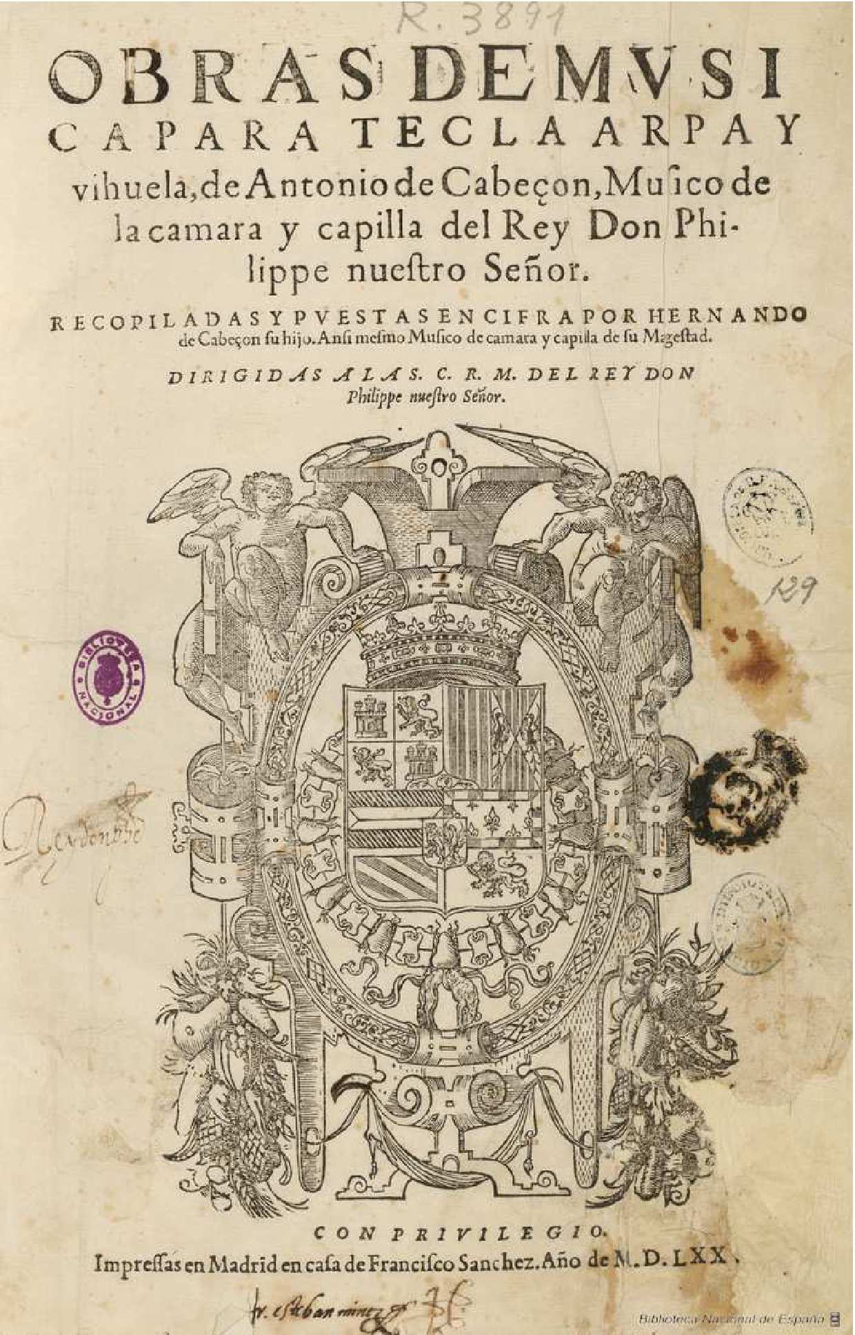 Obras de musica para tecla arpa y vihuela de Antonio de Cabeçon ... recopiladas y puestas en cifra por Hernando de Cabeçon ... Cabezón, Antonio de (1510-1566) Cabezón, Hernando de (ca. 1541-1602) Impressas en Madrid en casa de Francisco Sanchez. 1578